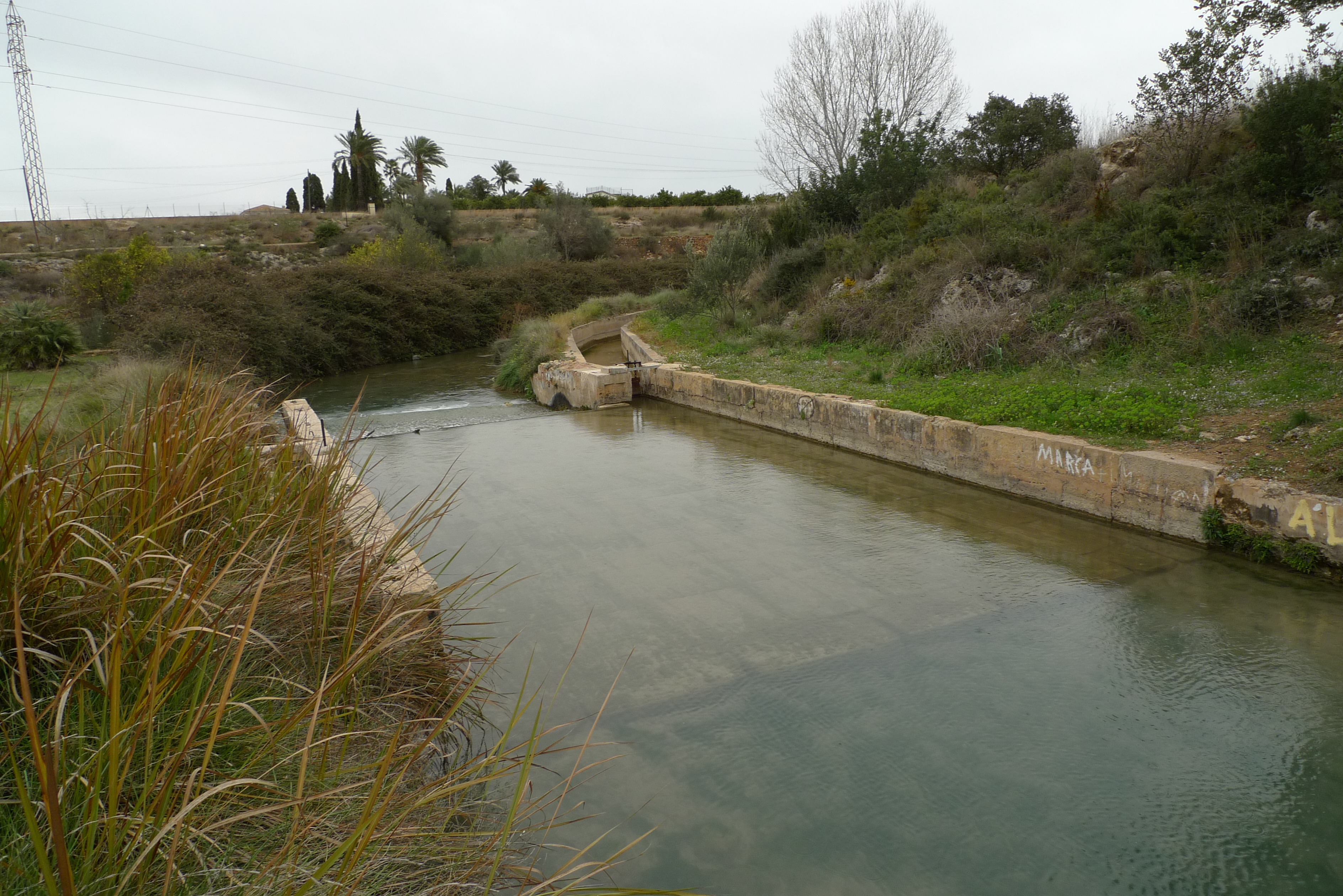 Cauce del Río de los Santos al paso del Partidor Real